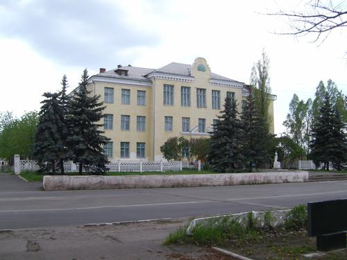 Счастье(город)